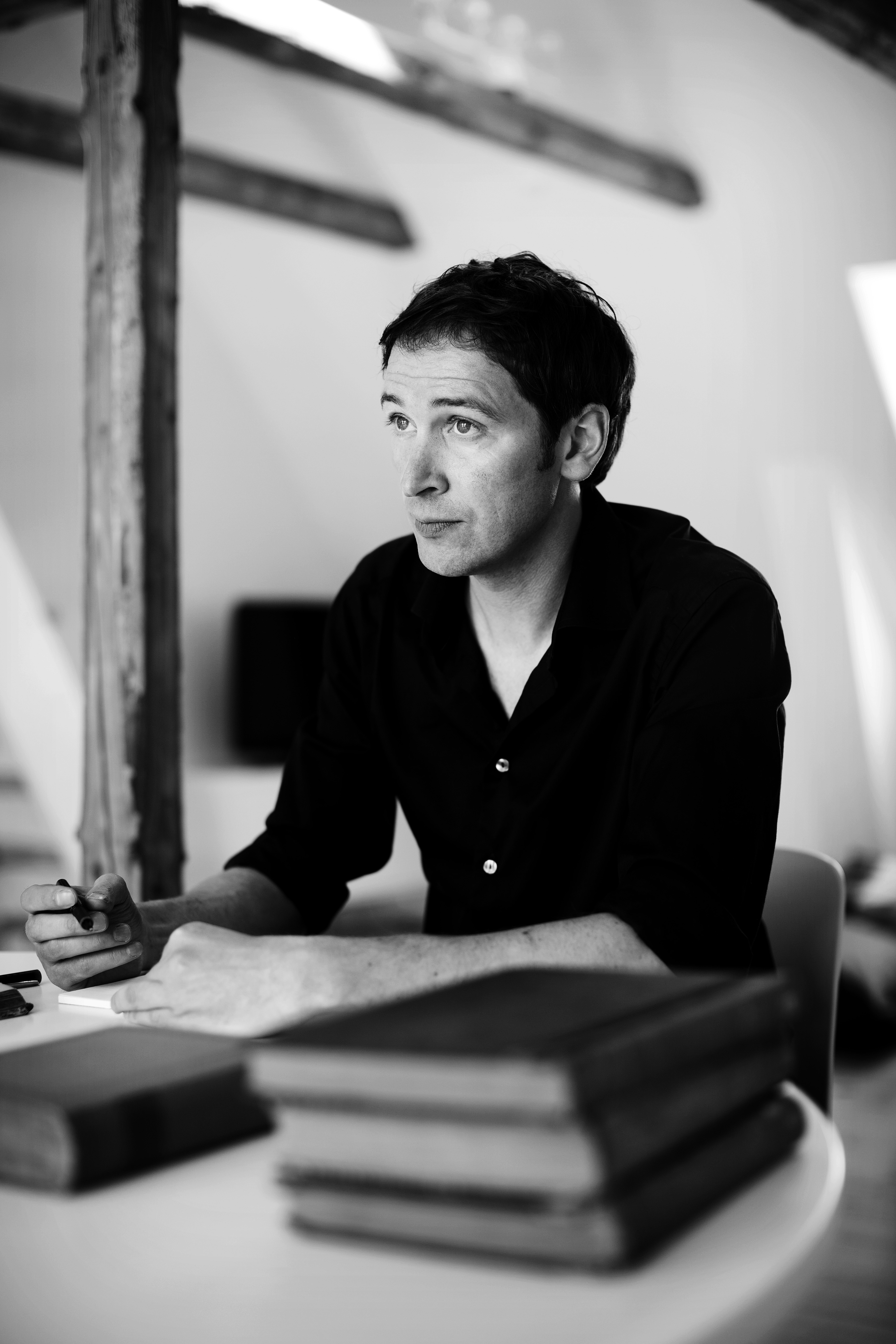 Jesper Wung-Sung